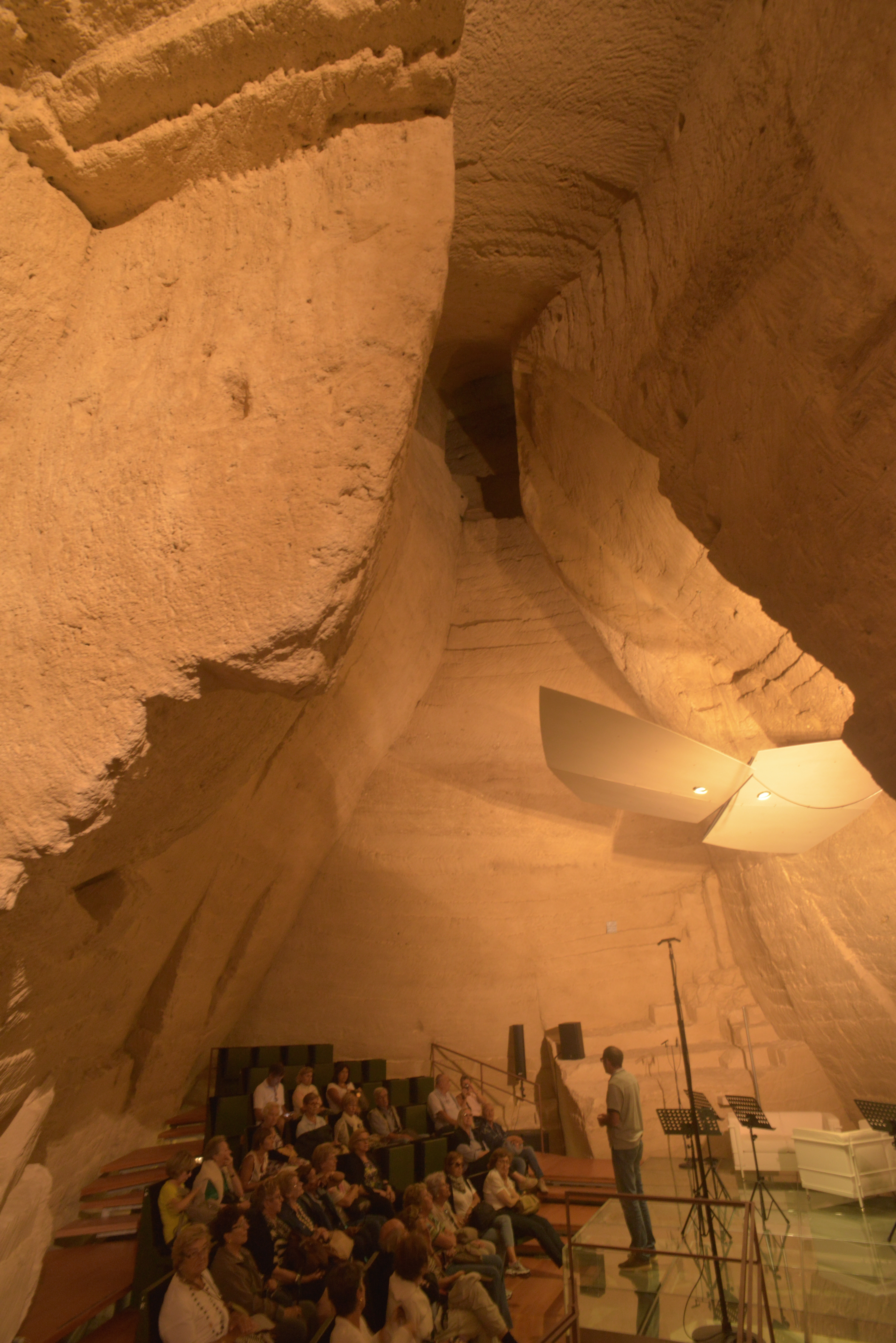 Casa Cava Suggestivo scorcio interno auditorium di Casa Cava This is a photo of a monument which is part of cultural heritage of Italy.